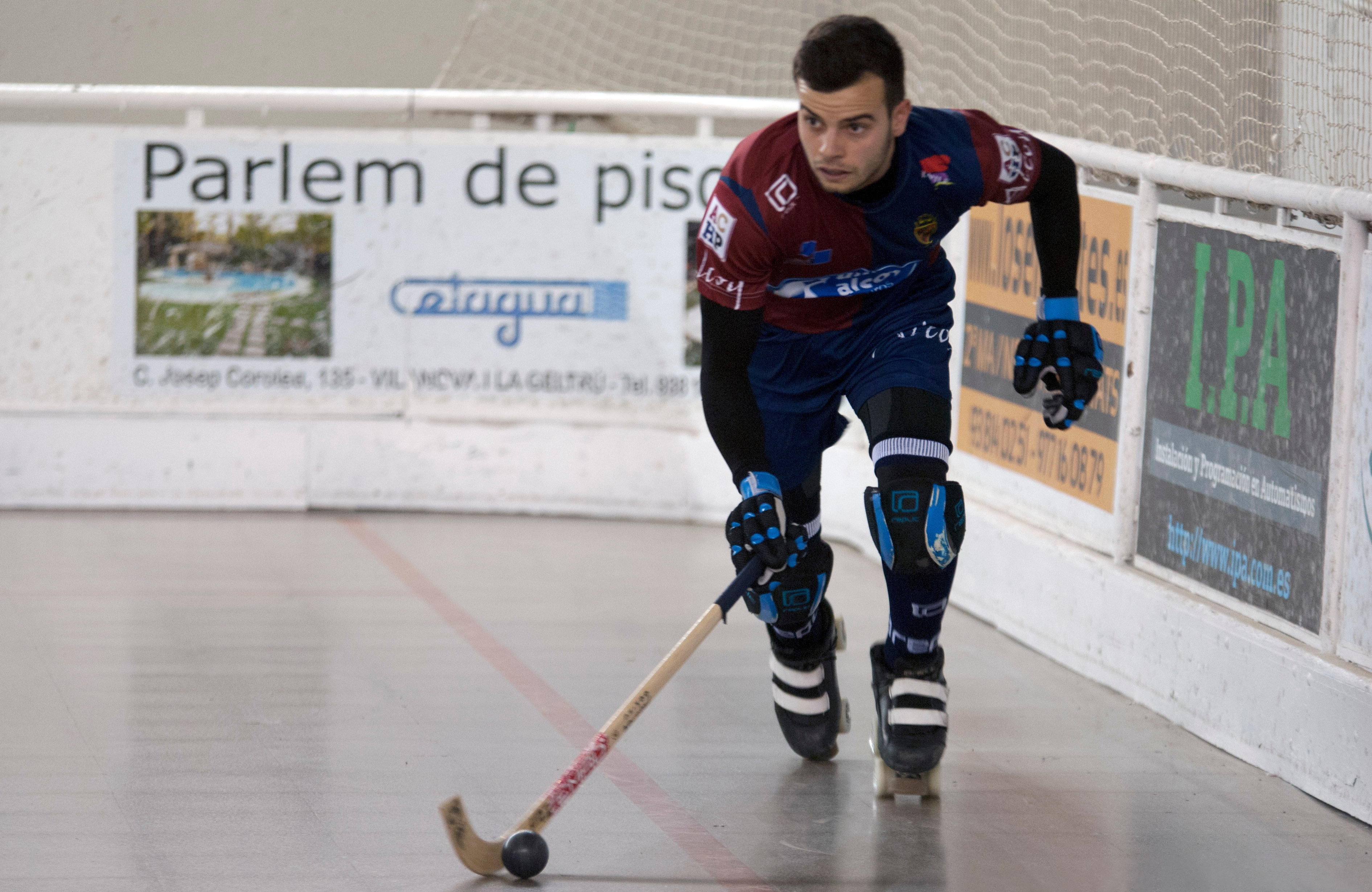 Imatges del partit Vilanova-Alcodiam de la OK Lliga